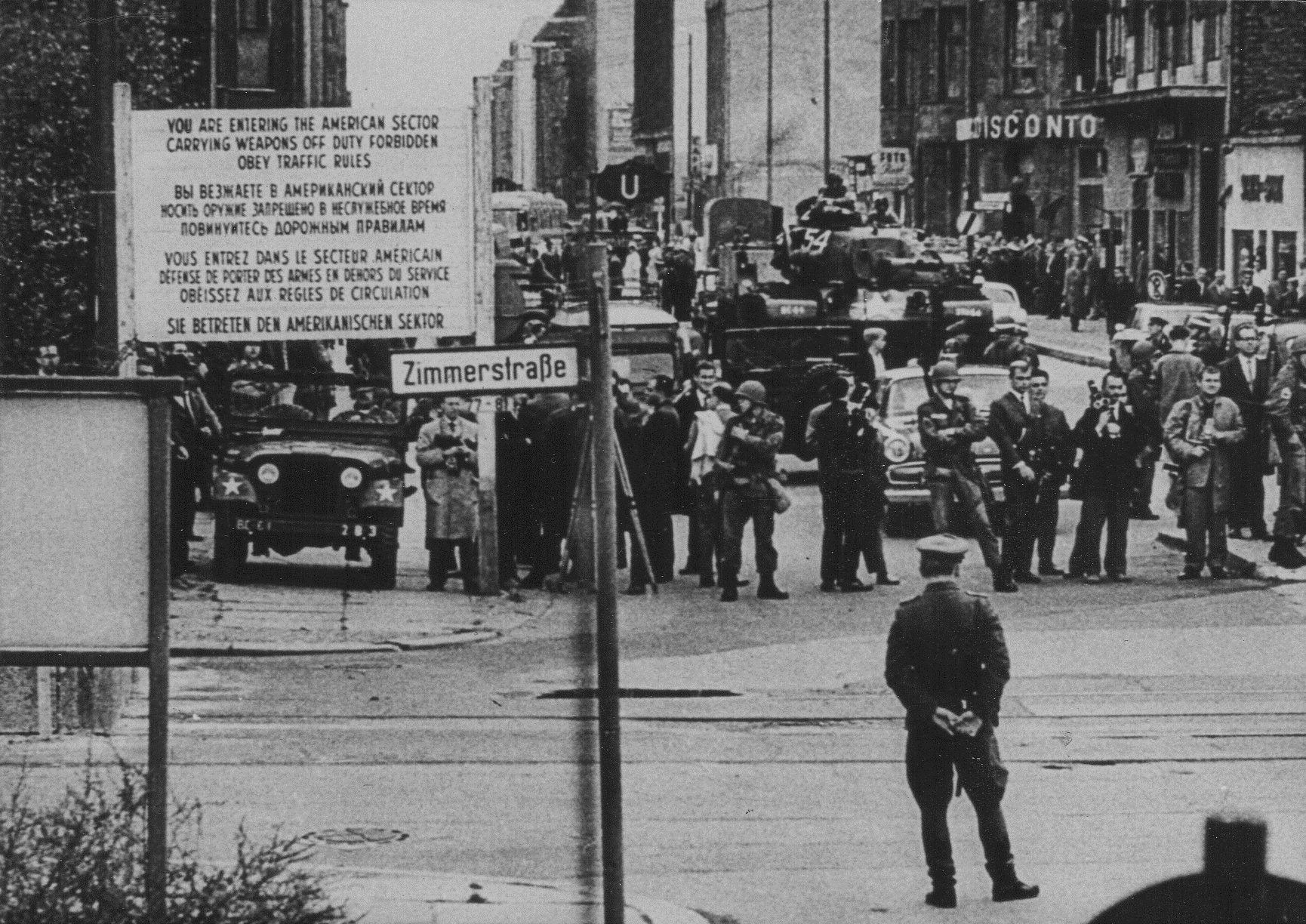 Das Bild zeigt Amerikanische Panzer, Soldaten sowie Presseleute. Gemacht von der DDR aus. Die Grenze verläuft unmittelbar vor der Menschenreihe, die Richtung Kamera blickt.